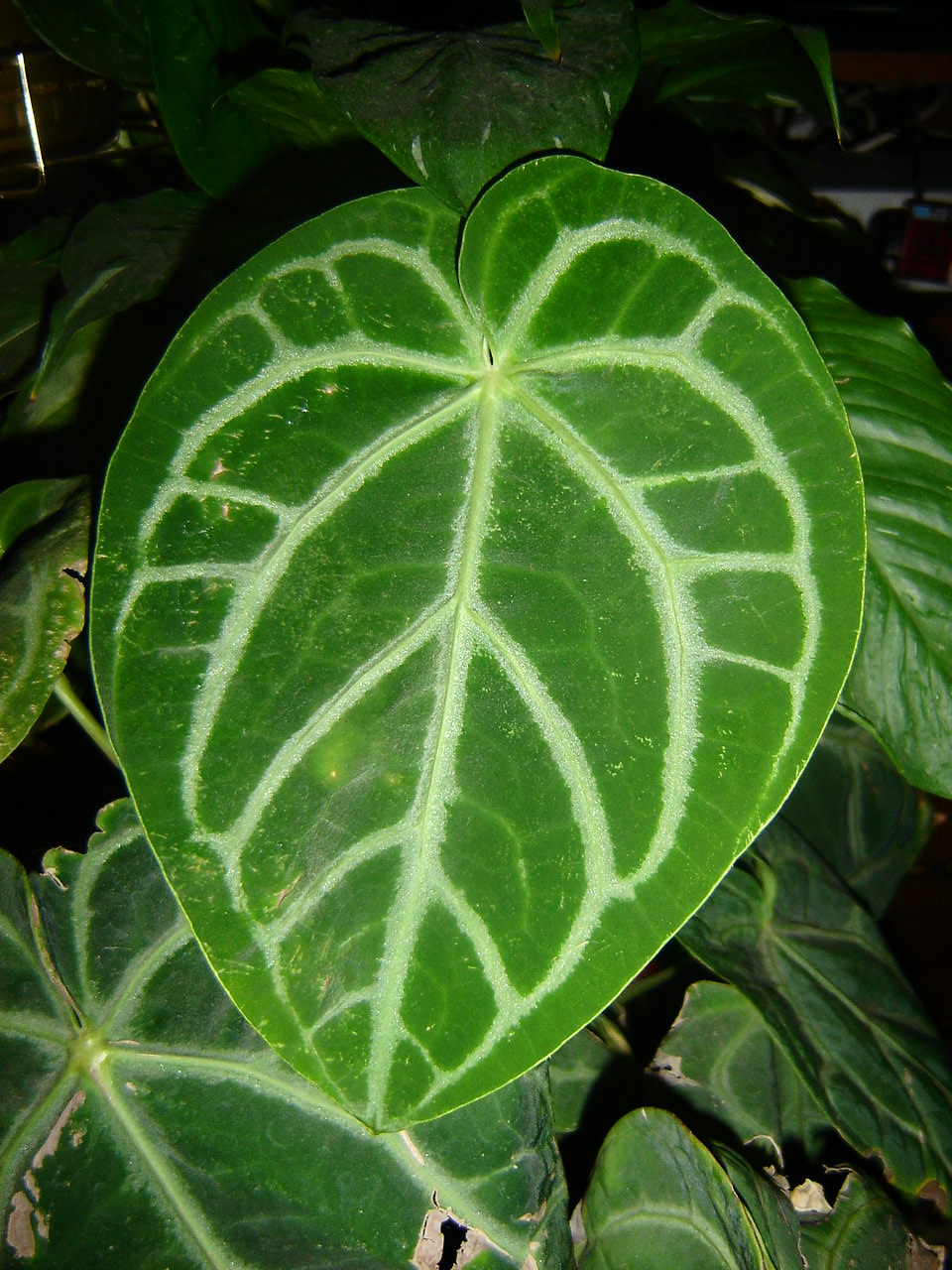 Anthurium magnificum